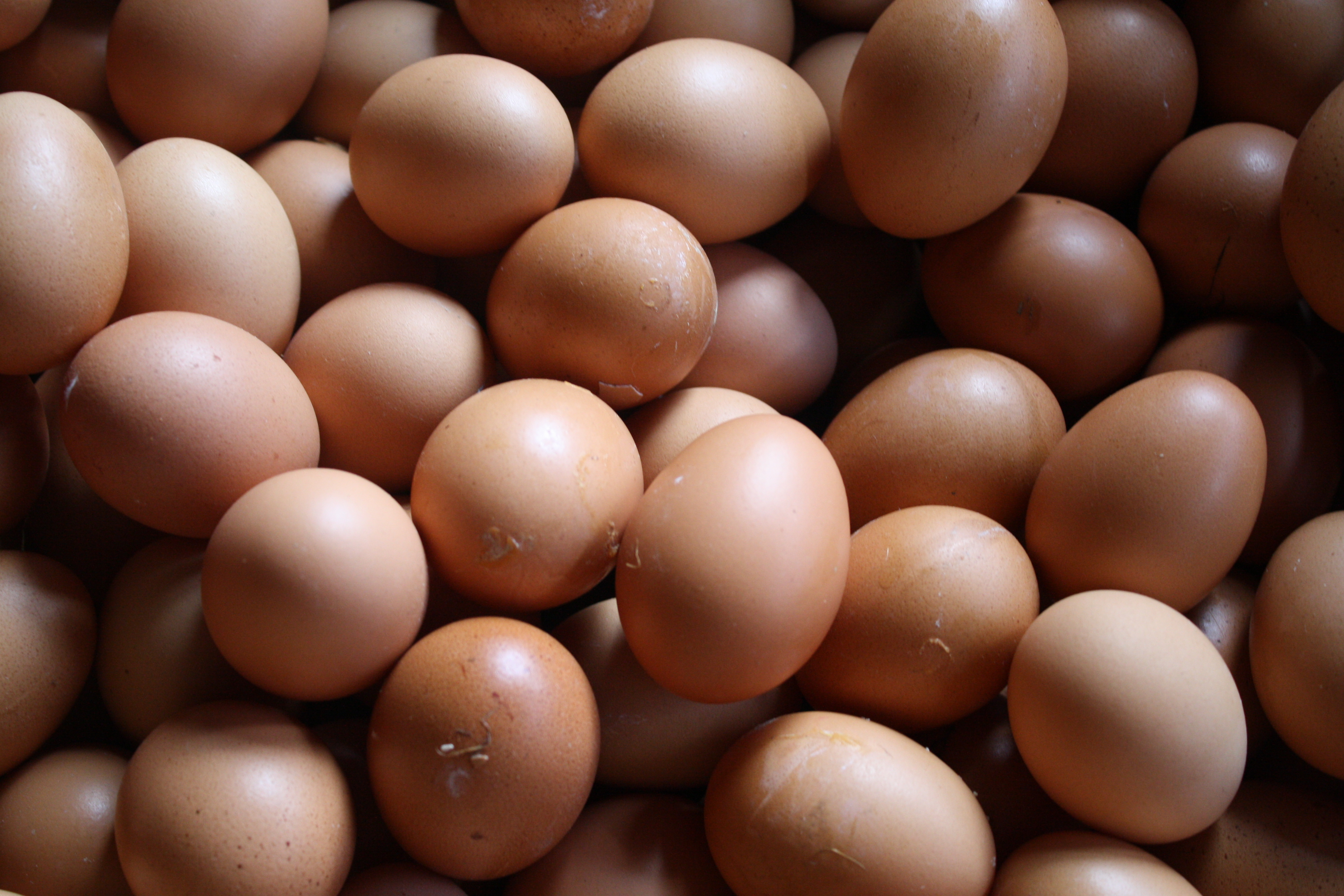 Telur ayam